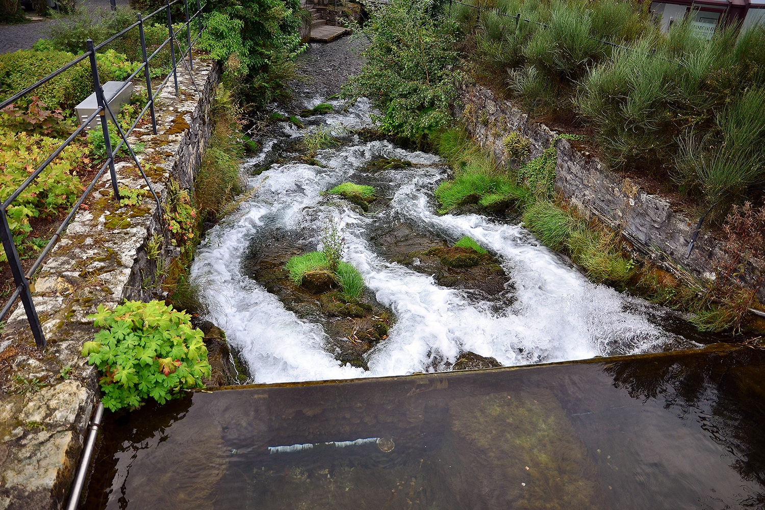 Lippequelle, Bad Lippspringe, NRW